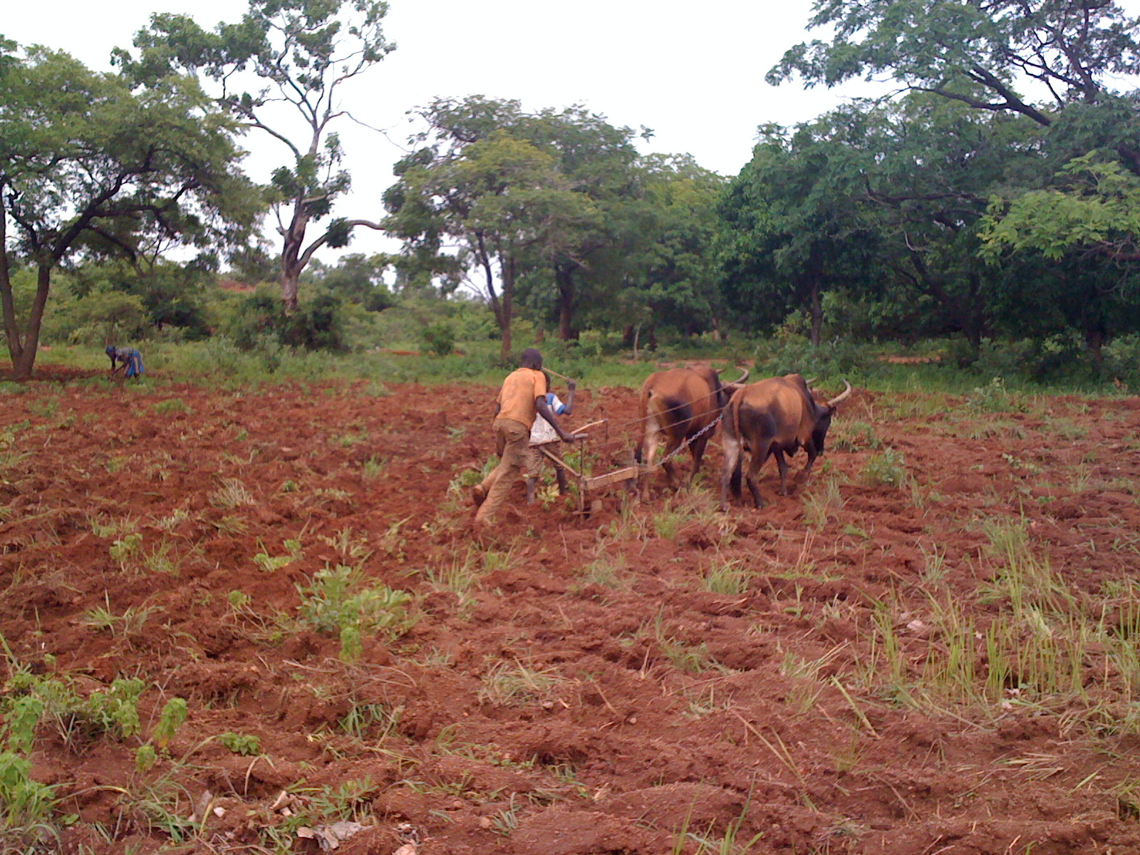 Travaux champêtres (culture attelée) près de Ferkessédougou, Côte d'Ivoire